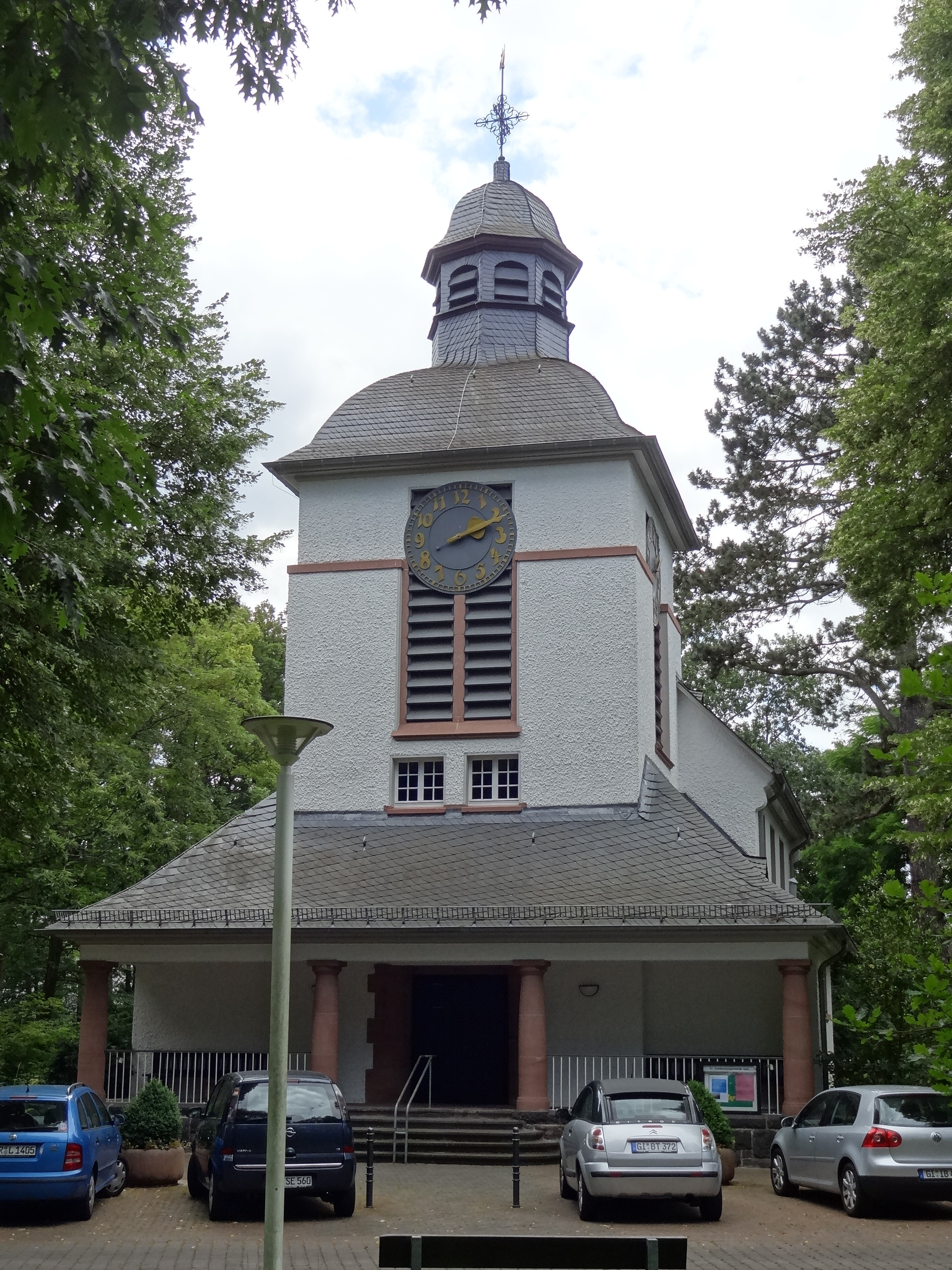 Kapelle in den VITOS-Kliniken für Psychiatrie